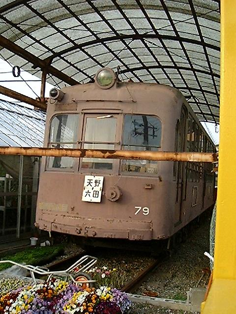 阪神71型電車79号車、伊丹市内で保存時の写真。